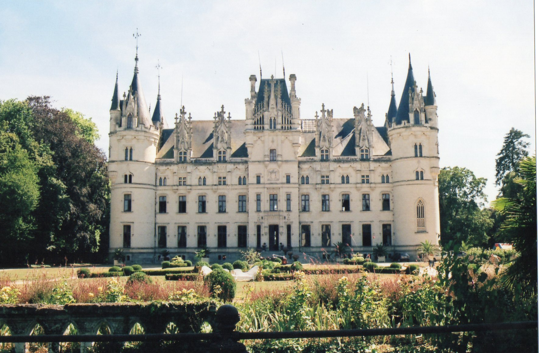 Château de Challain, Maine-et-Loire, France.